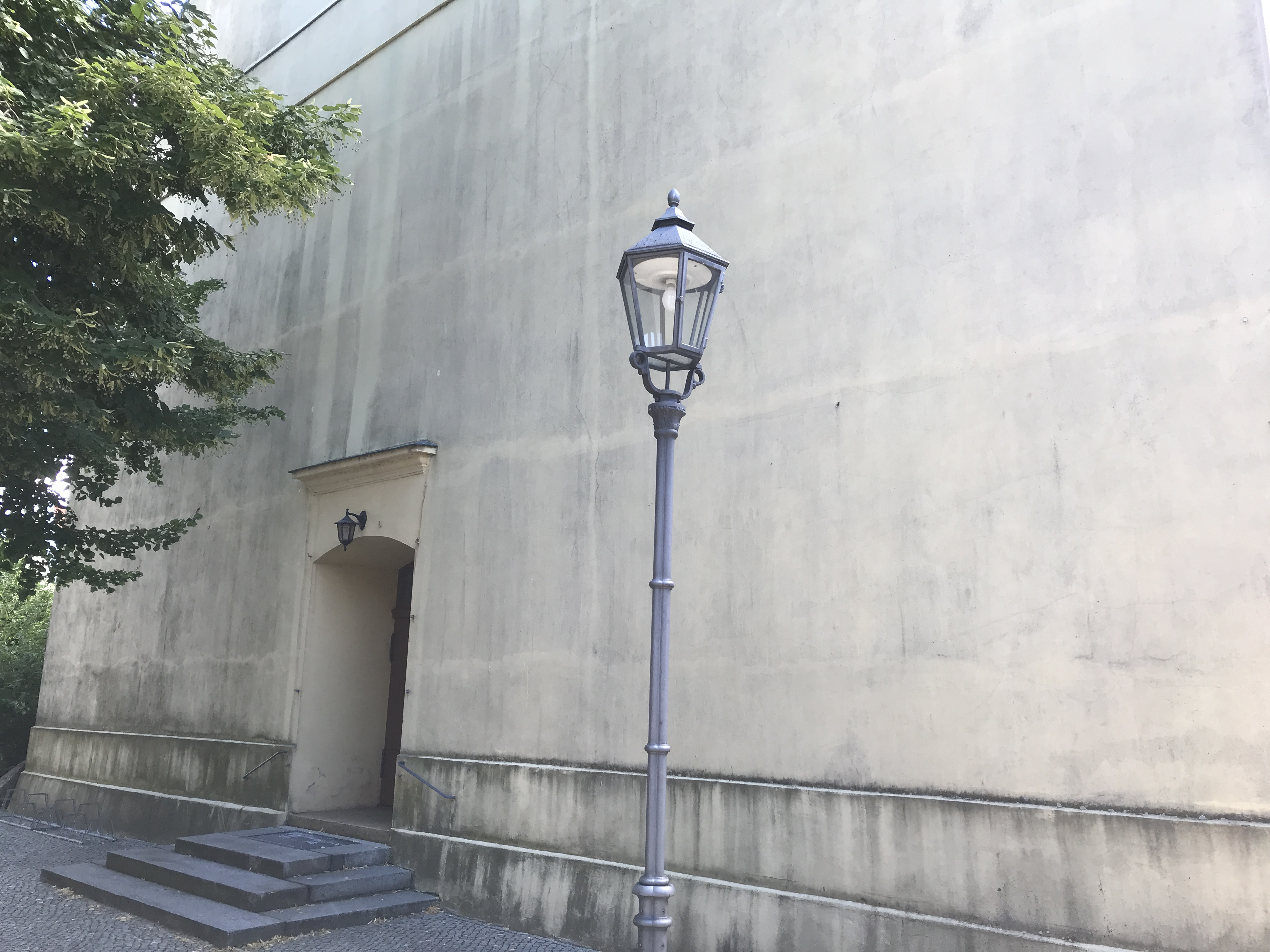 Die Stadtkirche Golßen im Land Brandenburg entstand in den Jahren 1811 bis 1820 nach Plänen des Berliner Baurats Colberg. Die Kirchenausstattung stammt weitgehend aus der Bauzeit.